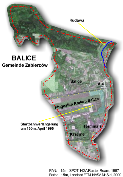 Dorf Balice SAT